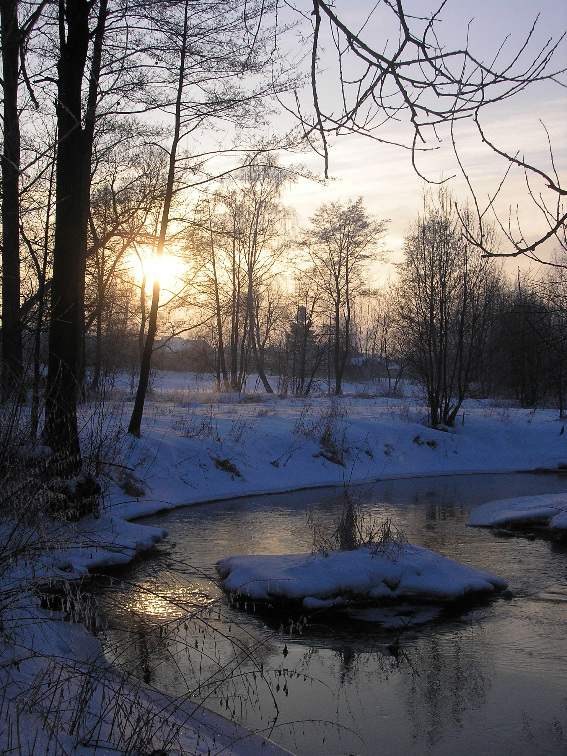 Kurówka River in Chrząchów, Poland